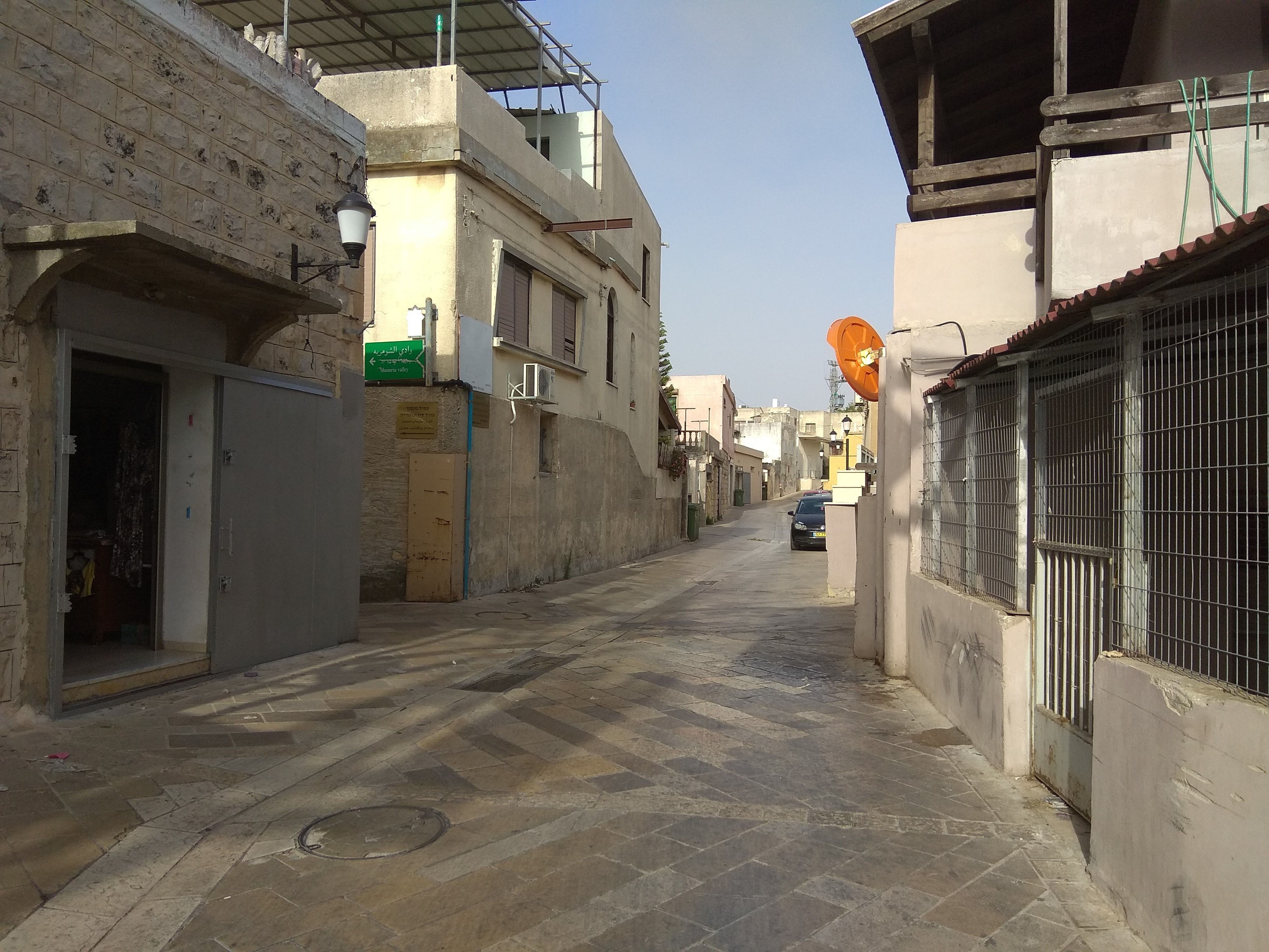 עספיא